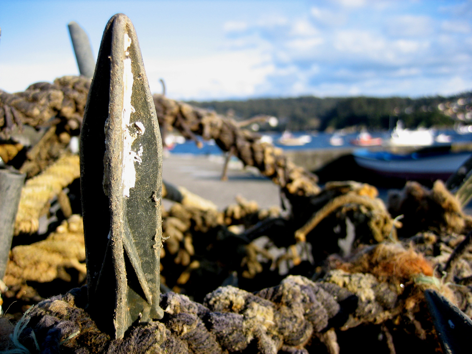 Porto de Lorbé, Dexo, Oleiros